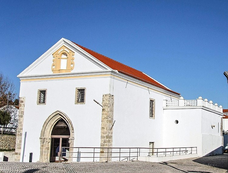 Igreja do Mosteiro de Nossa Senhora das Virtudes